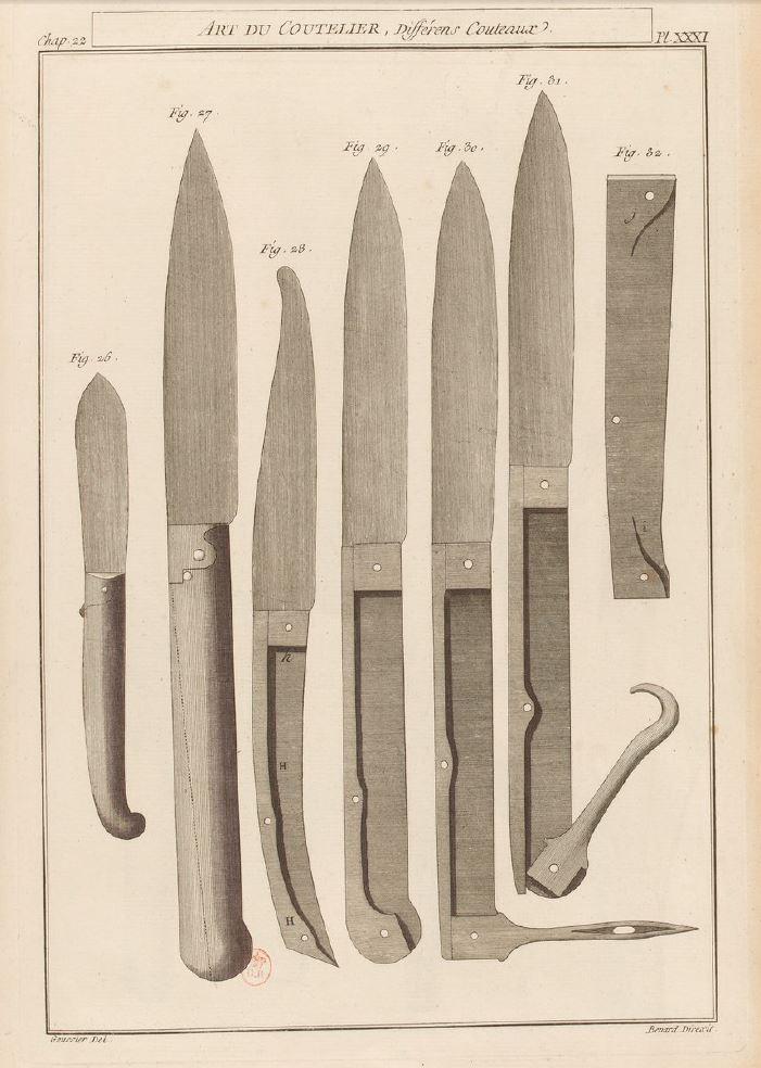 Planche de l'ouvrage de Jean-Jacques Perret (1730-1784), L'art du coutelier, première partie (1771) - Reproduction de la planche 31